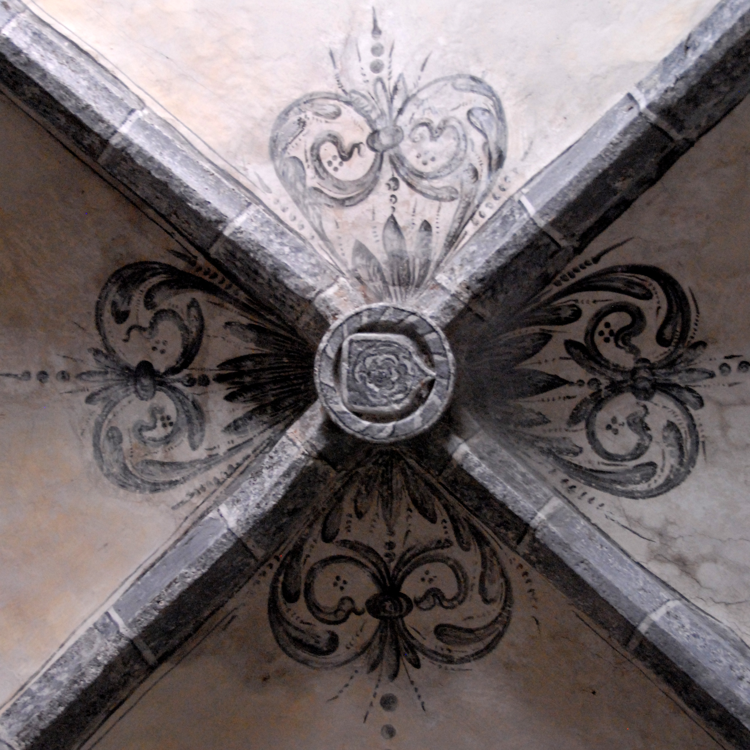 Abteikirche St.-André Lavaudieu, Schlussstein im Seitenschiff